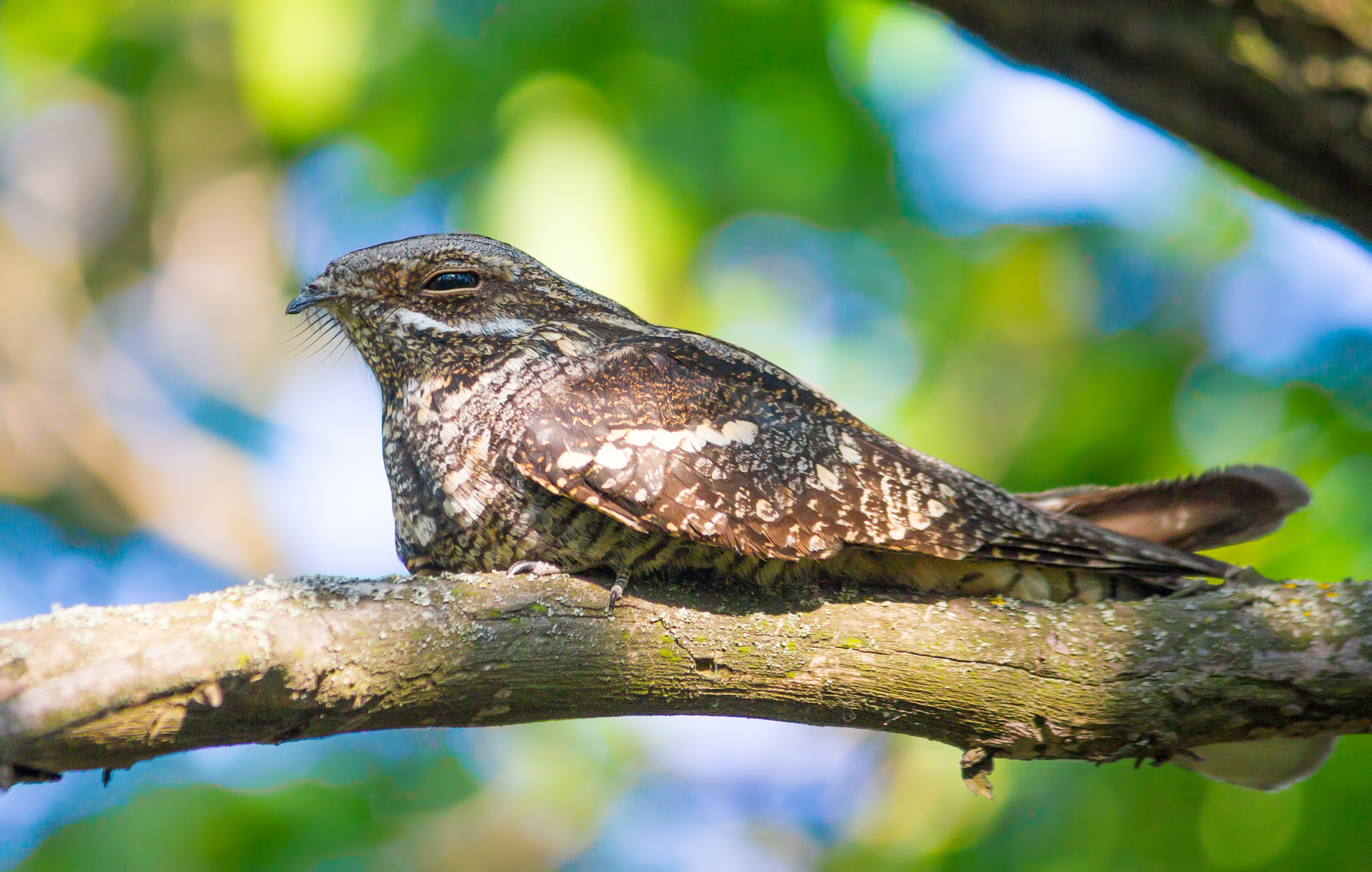 «Дніпровські пороги», м. Запоріжжя, о. Хортиця, о. Байда та скелі посеред р. Дніпро